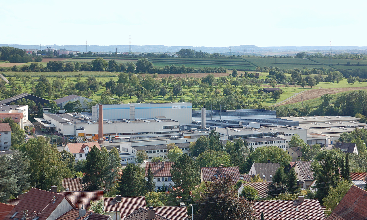 Magna-Näher-Werksgelände Markgröningen (von der Plattform des Oberen Tors)